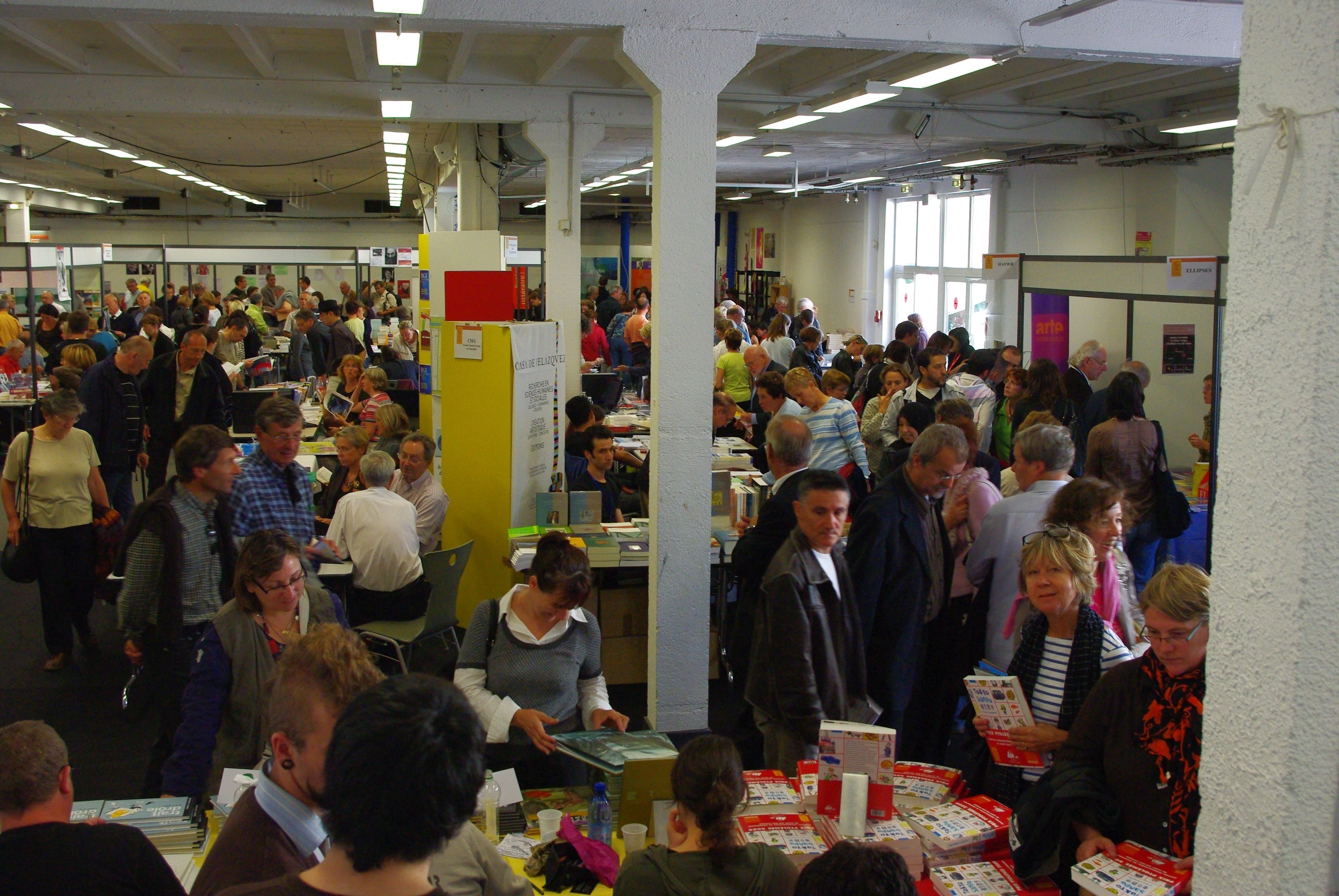 Vue sur le Salon du livre du Festival International de Géographie 2009 de Saint-Dié des Vosges